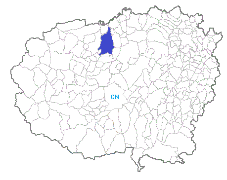 Posizione del comune nella provincia di Cuneo